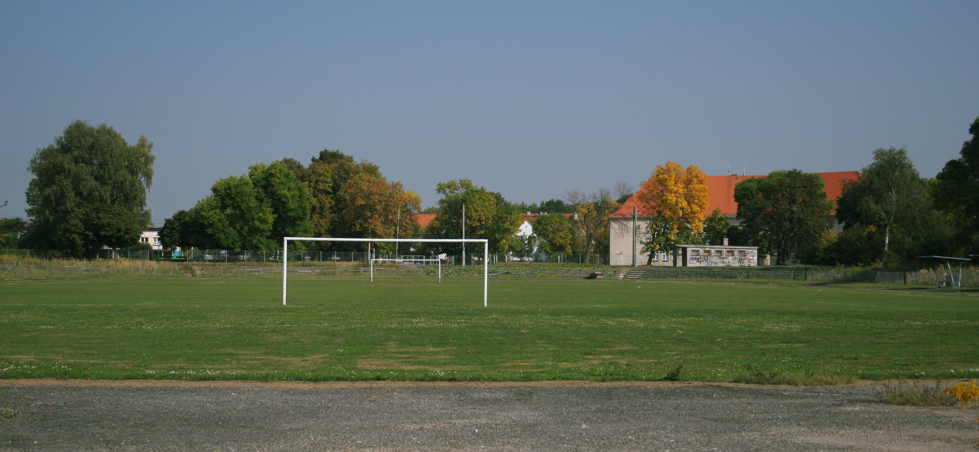 Boisko w Wilczym Gardle, dzielnicy Gliwic, woj. śląskie